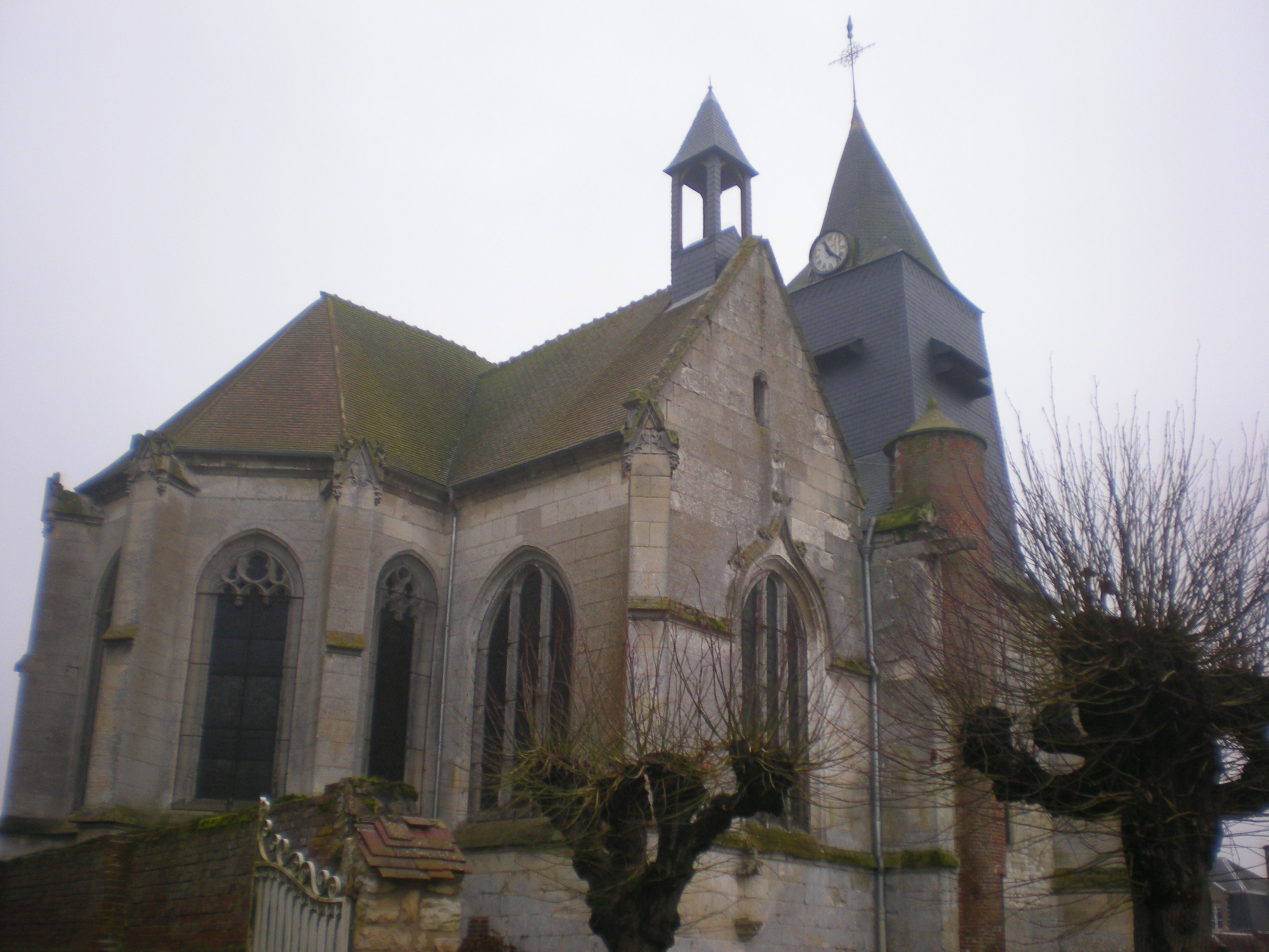 Vue nord-est de l'église Saint-Lucien de Litz (Oise).